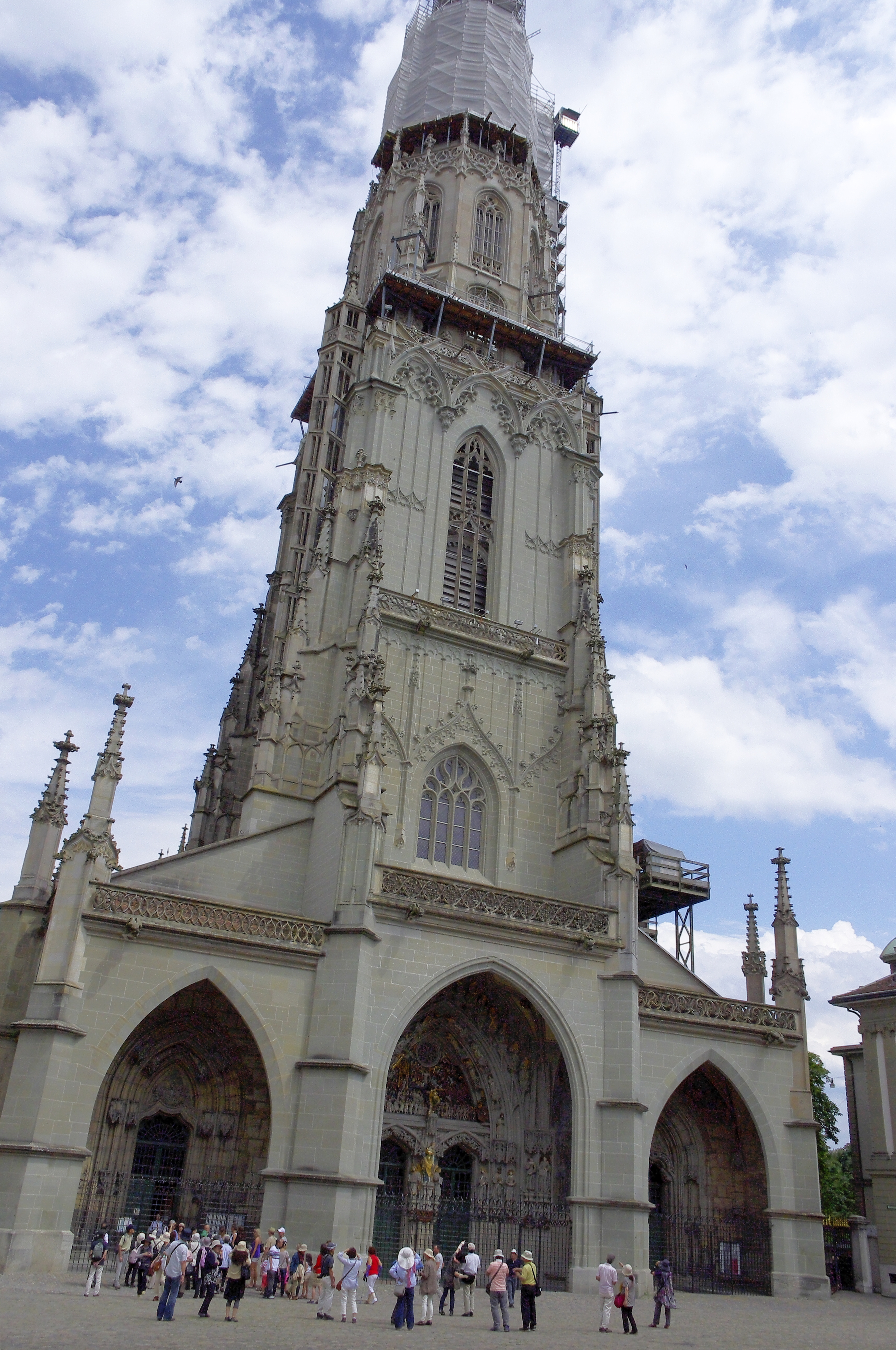 Bern, Münster